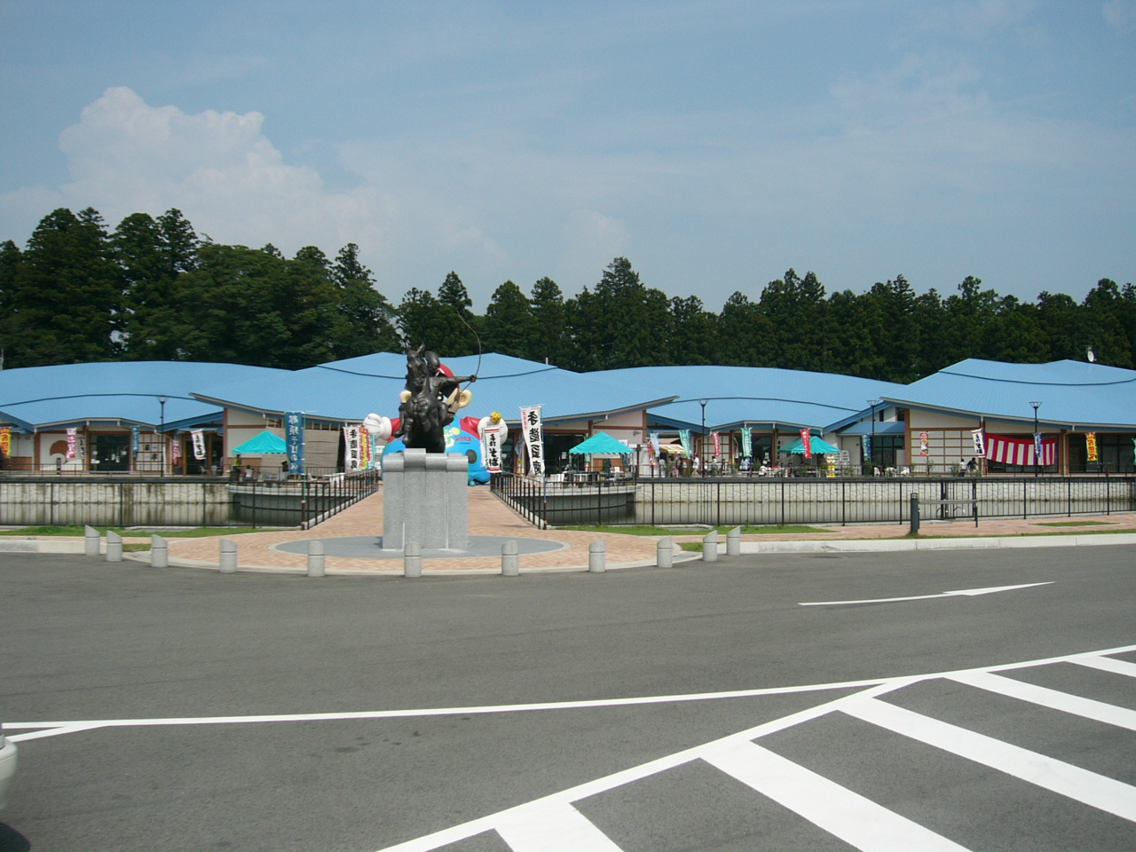 Michinoeki Nasuno Yoichi no Sato (Tochigi) (道の駅那須与一の郷)